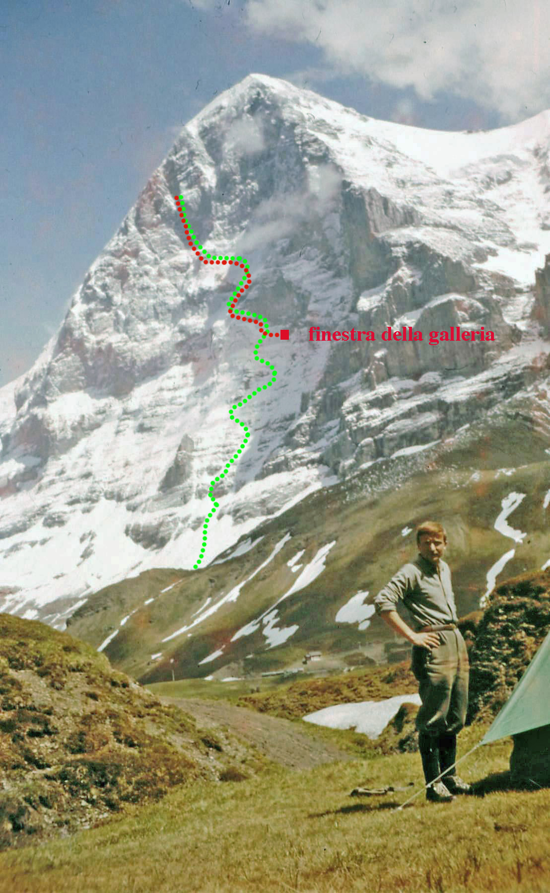 percorsi di acesa e discesa dalla Nordwand Eiger